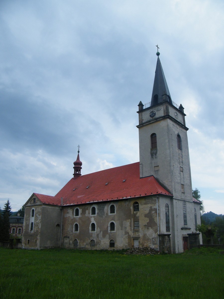 Kostel svaté Kateřiny Alexandrijské v Dolním Podluží